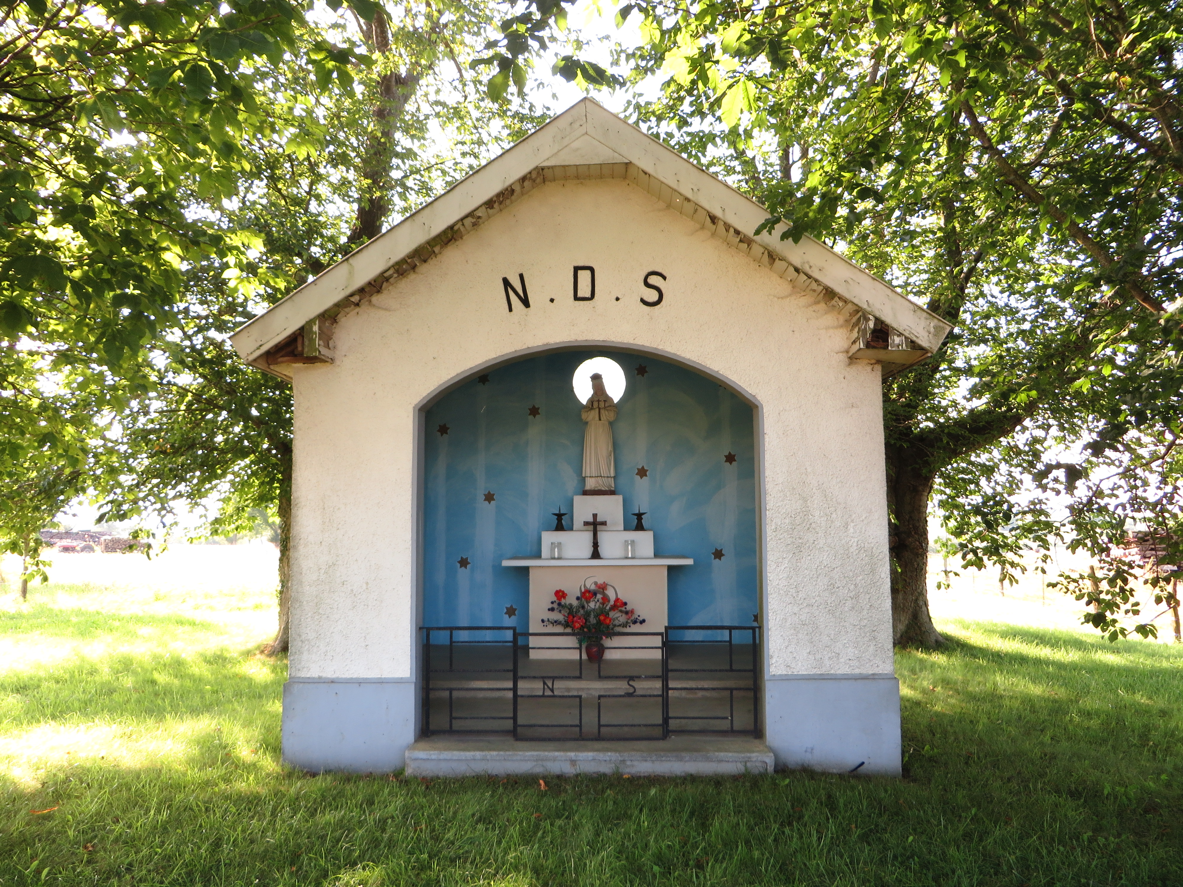 Véry La chapelle Notre-Dame-de-la-Salette